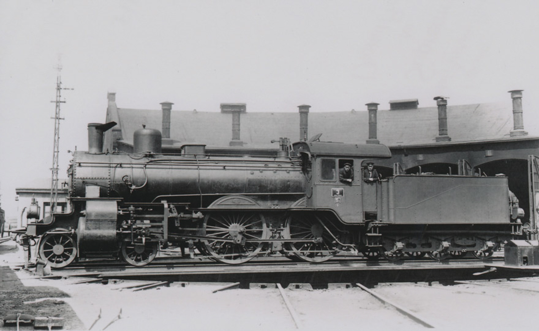 Damplokomotive der Bauart S 5 der Lübeck-Büchener Eisenbahn, Nr. 3 (ursprünglich Nr. 74 MOSEL; Baujahr 1907, ausgemustert 1930)